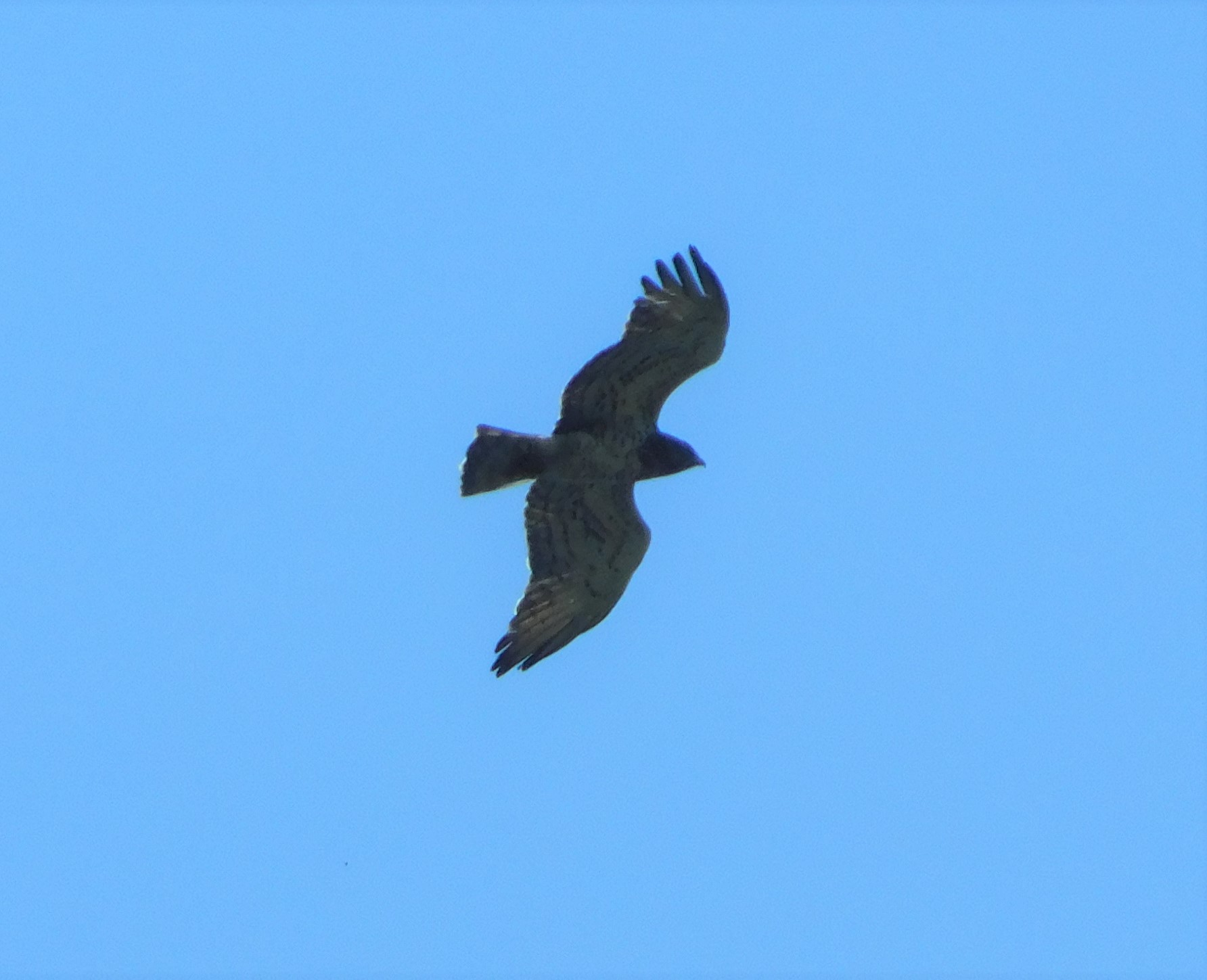 Srpski (latinica): Zmijar (Circaetus gallicus) je ptica grabljivica srednje veličine. Naseljava brdsko-planinske predele pod sastojinama četinara i mozaično-otvorene predele sa otvorenim terenima na kojima lovi. Pretežno se hrani zmijama, nešto ređe krupnim gušterima, a povremeno lovi i vodozemce, sitne sisare i ptice. Smatra se da populacija u poslednje tri decenije umereno raste. Selica je.